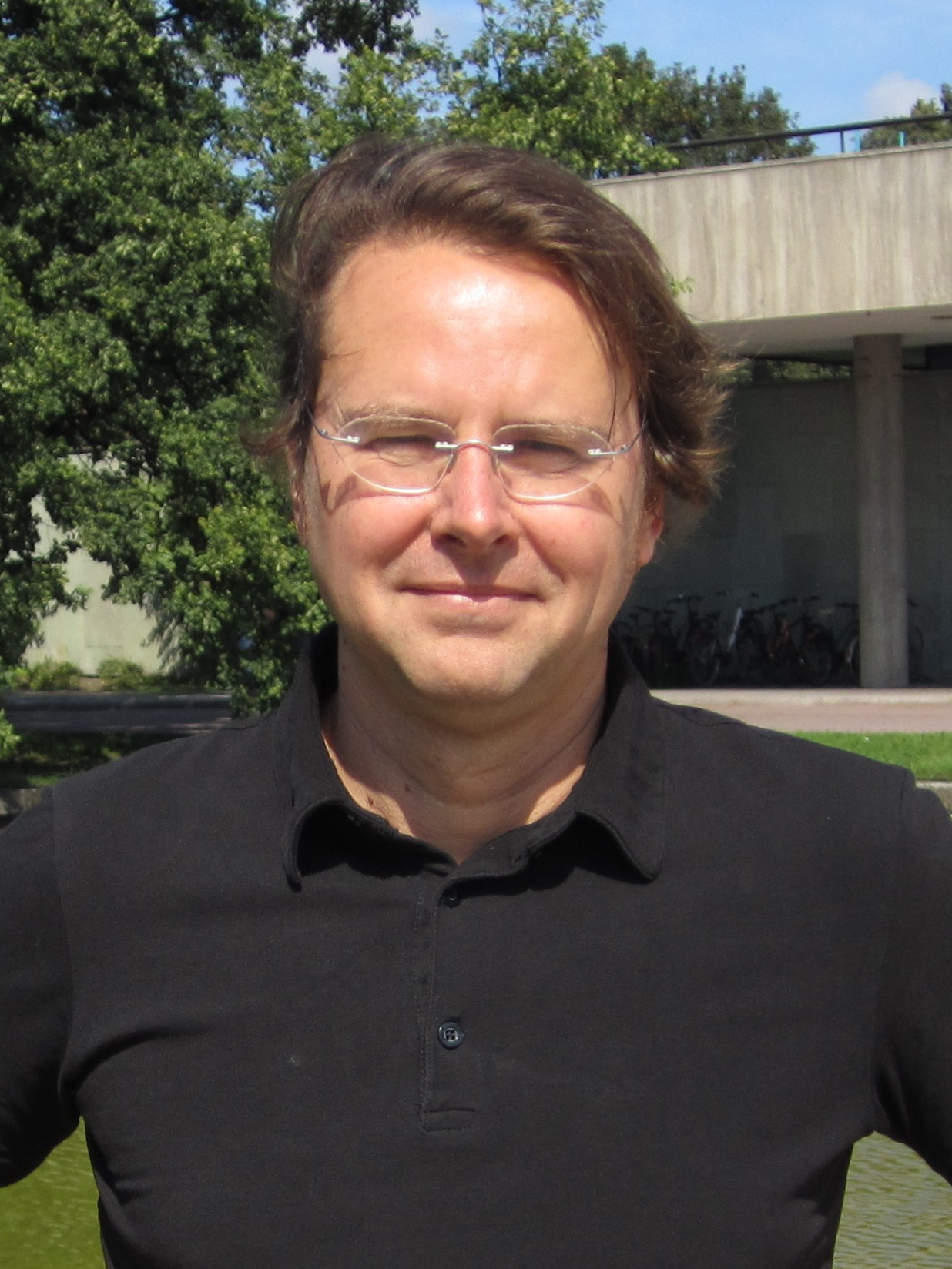 Martin Unfried, Experte für europäische Umweltpolitik, European Institute of Public Administration und Kolumnist der taz („Ökosex“) (D) | am 20.08.2011 vor dem Haus der Kulturen der Welt in Berlin | Short-Link zu diesem Bild